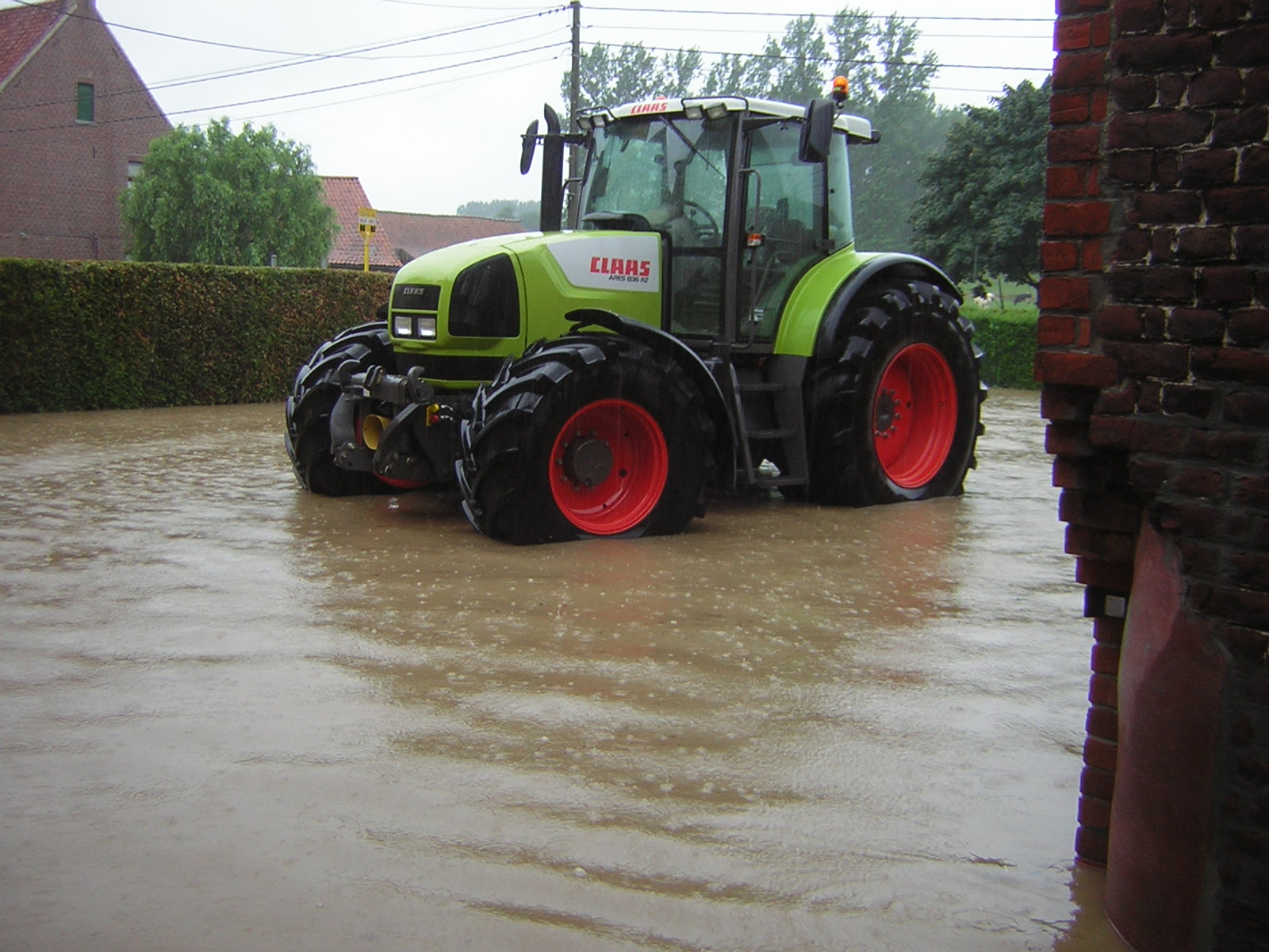 Claas Ares (?) tracteur dans toutes les conditions. Place de cordes sous eau, innondée en 1991 et 2005.